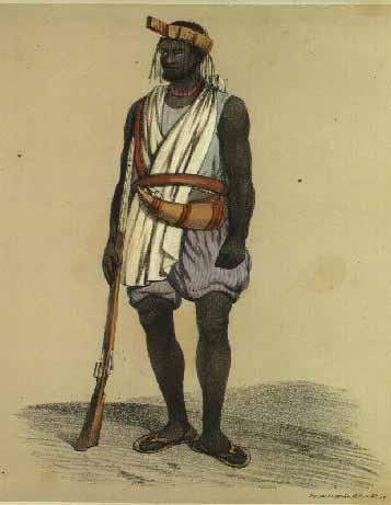 Wolof du Waalo en costume de guerre (Illustration de Voyage dans l'Afrique occidentale, Anne Raffenel)